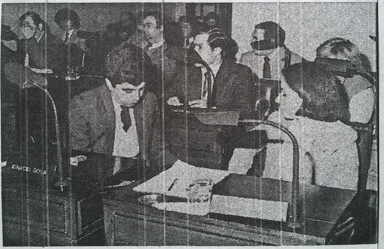 Imagen de la primeras sesiones de la Legislatura Territorial 1984. Archivo de Luis B. Zamora